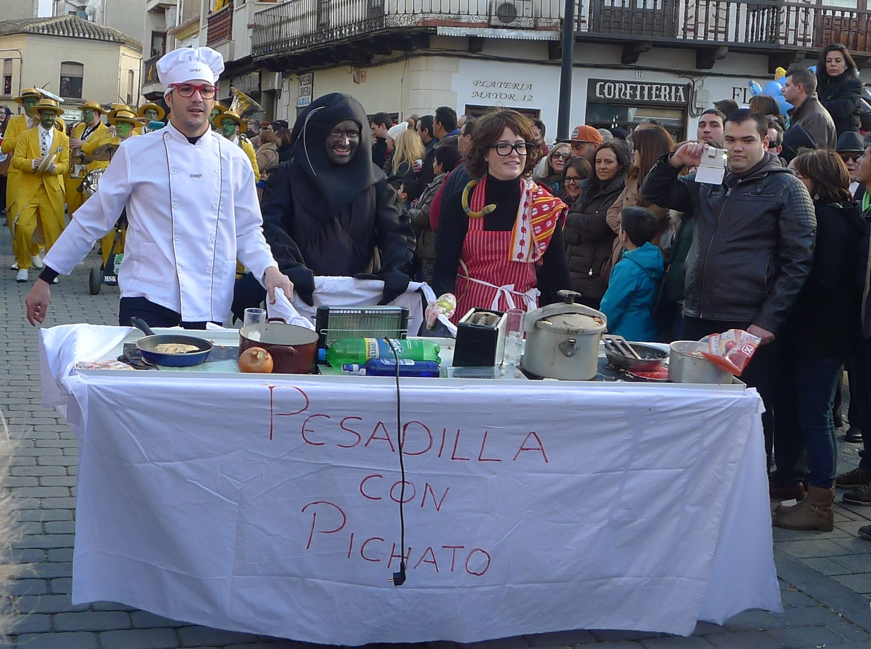 Carnaval 2015